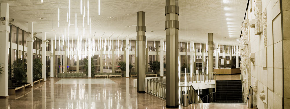 Foyer 2 (Obergeschoss) des Kultur- und Kongresszentrums Gera nach Modernisierung und Einbau des neuen Beleuchtungssystems "Lichtregen"